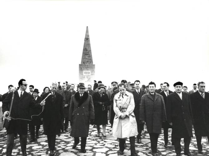 Tito polaže vence na Kadinjači 1966. godine